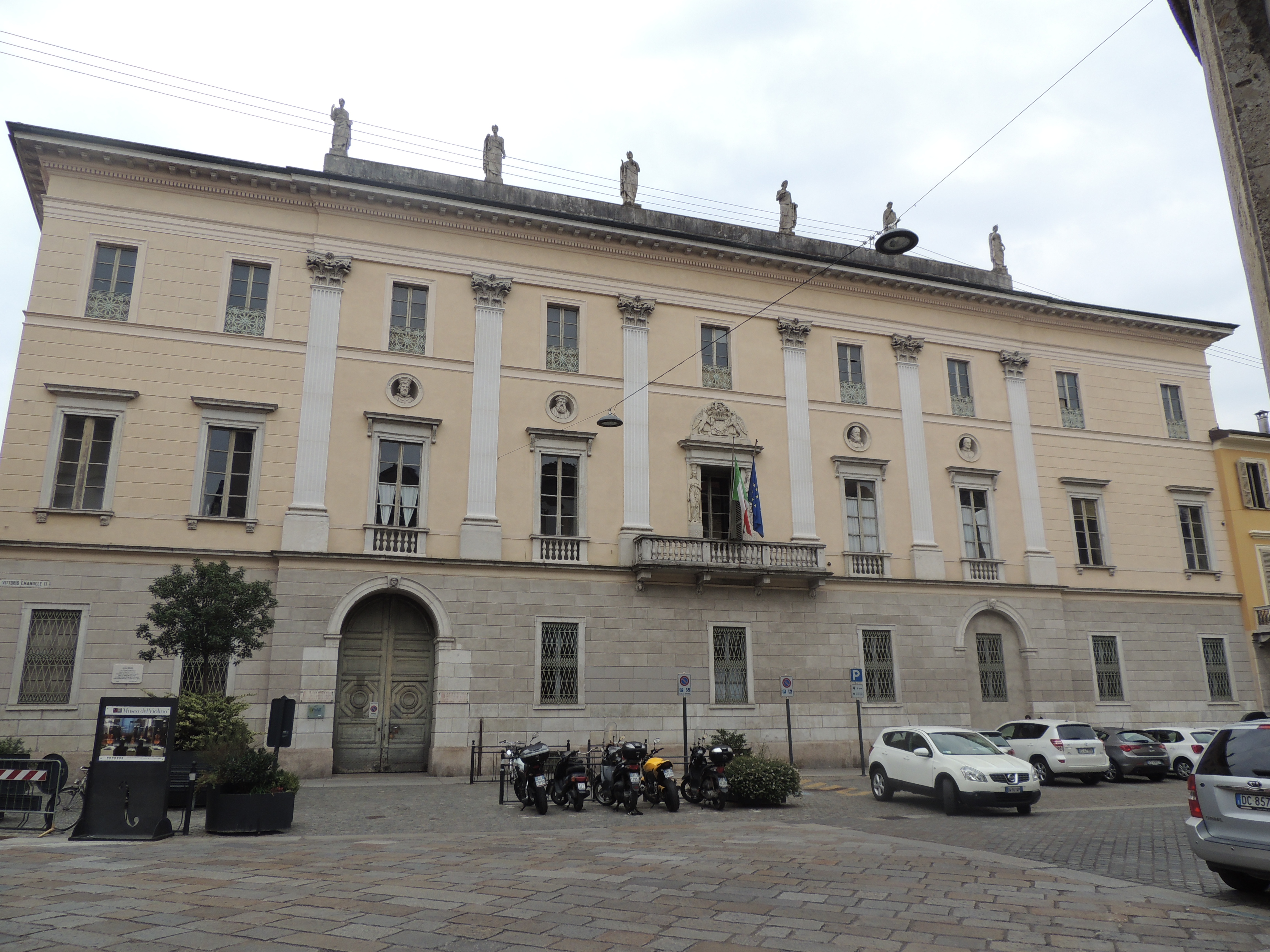 Palazzo Ala Ponzone This is a photo of a monument which is part of cultural heritage of Italy.